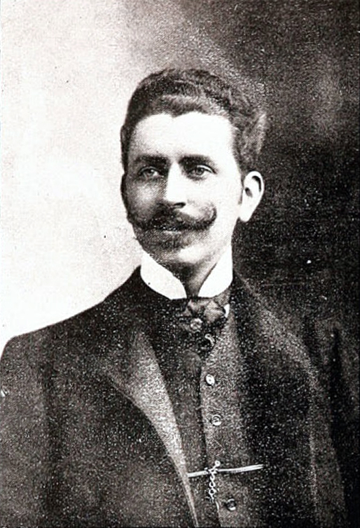 Alejandro Huneeus García-Huidobro, (Santiago, Chile, 1874 - París, Francia, 29 de junio de 1935). Abogado y político conservador chileno. Hijo de Isidoro Huneeus Zegers y Javiera García-Huidobro Arlegui. Contrajo matrimonio con Enriqueta Gracia Cox Larraín, y en segundas nupcias, con Loreto Fernández Jaraquemada.